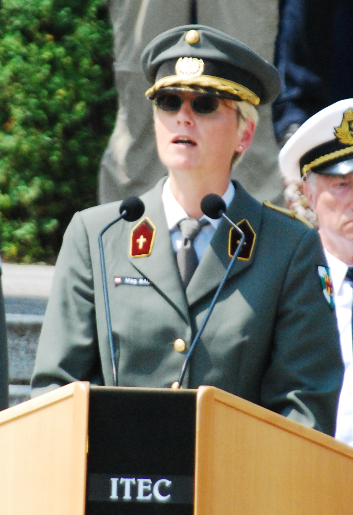 Susanne Baus bei der Lissa-Feier am 20. Juli 2010 in Wien